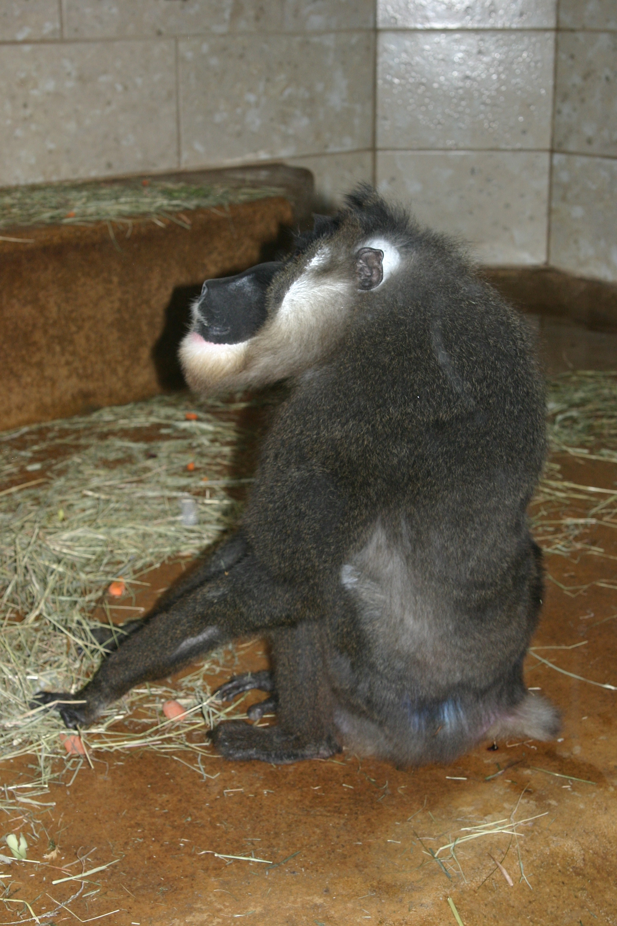 Mandrillus leucophaeus, old male